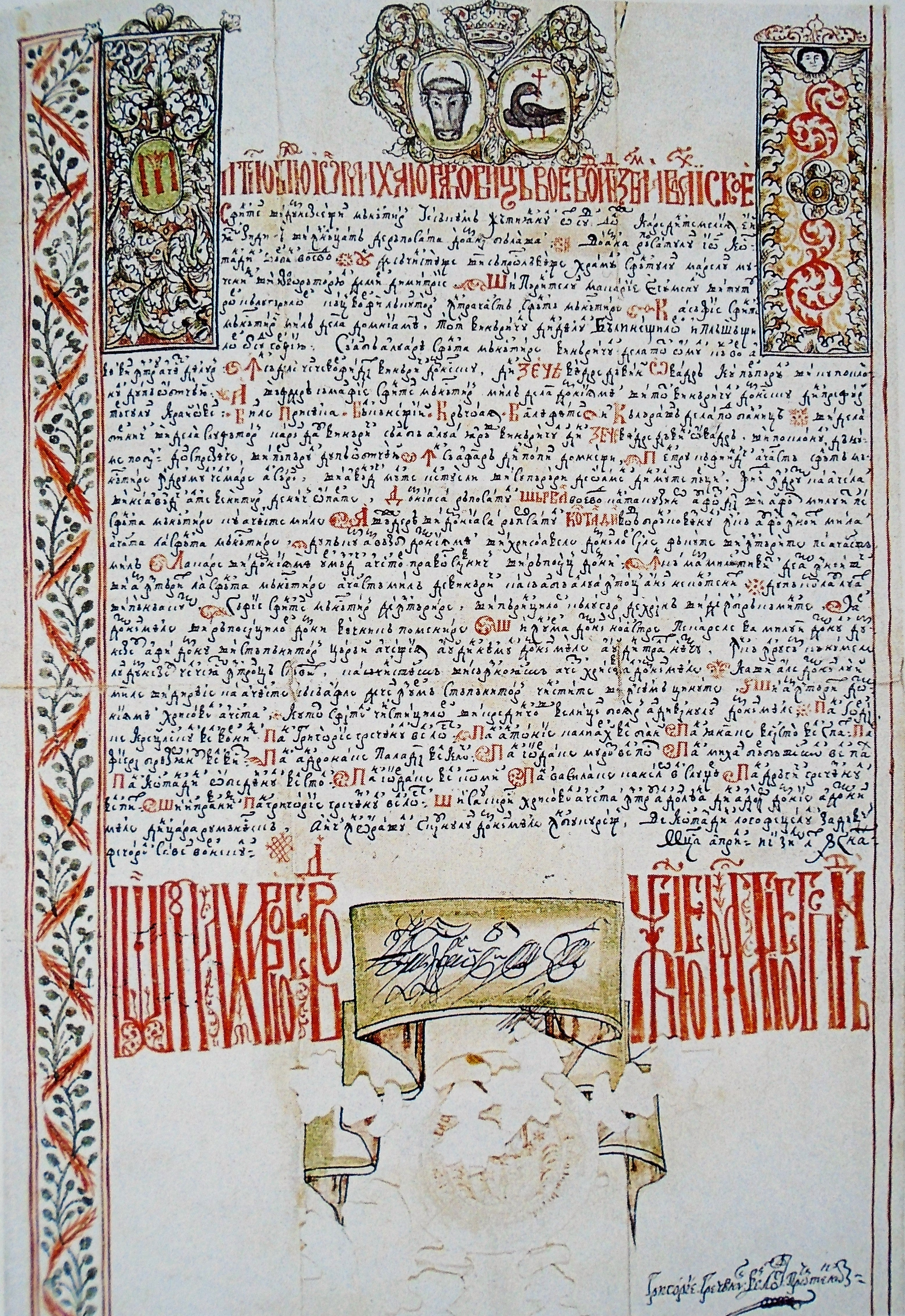 Hrisovul lui Mihail Racoviță de la 18 aprilie 1743, prin care dă Mănăstirii Jitianu mila vinăriciului